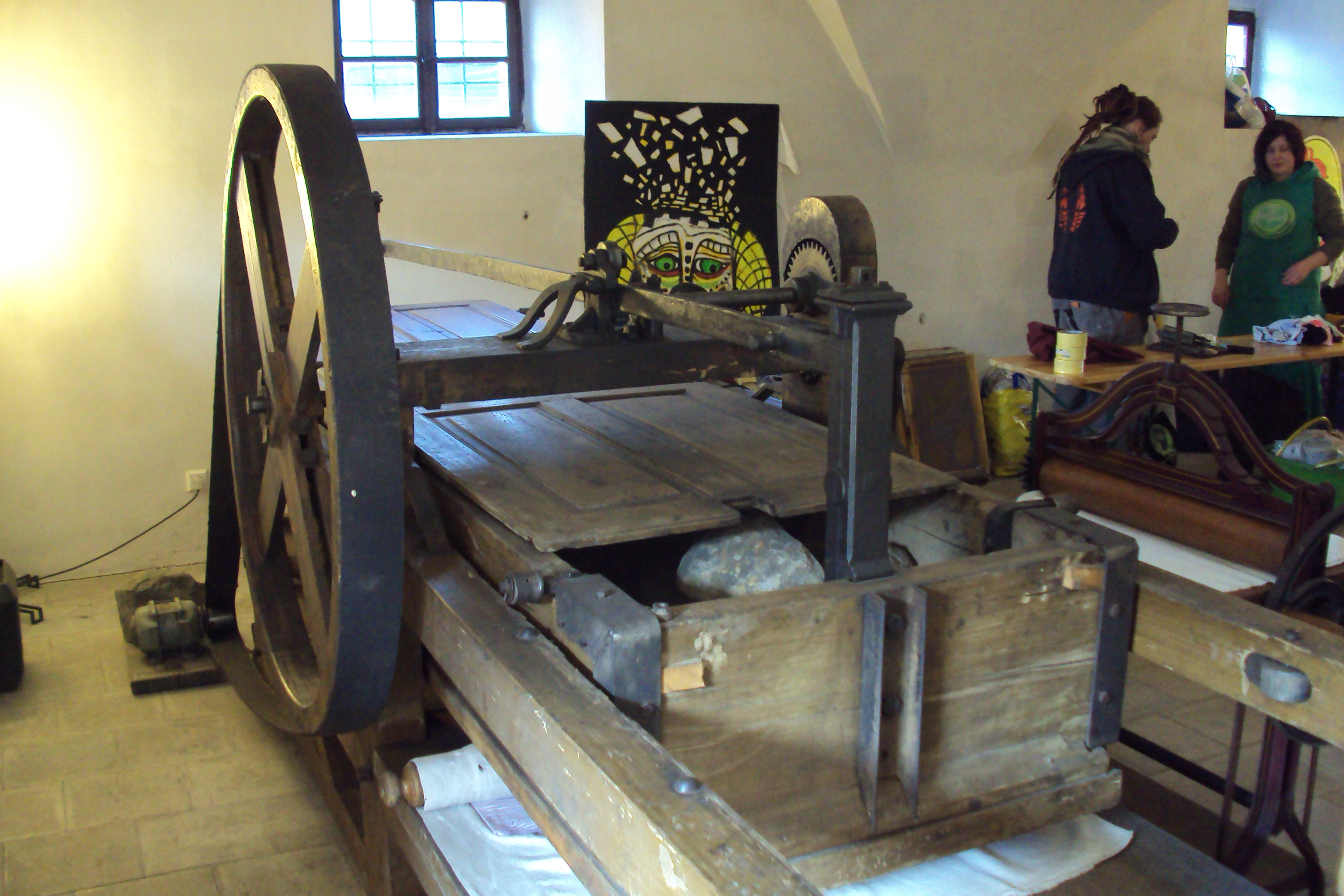 Exponáty muzea Vísecká rychta Kravaře